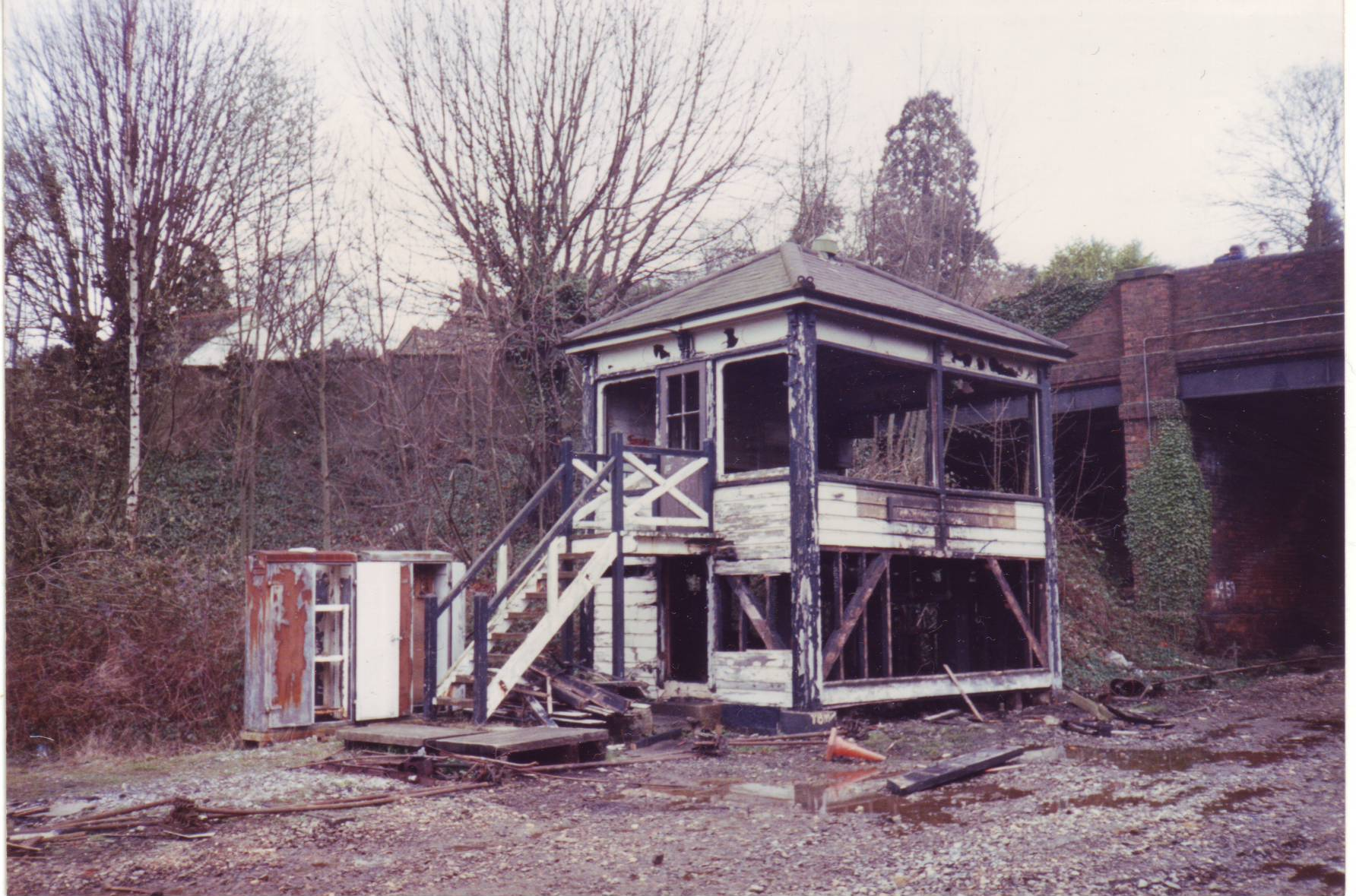 Former "B" signalbox at Tunbridge Wells West, Kent